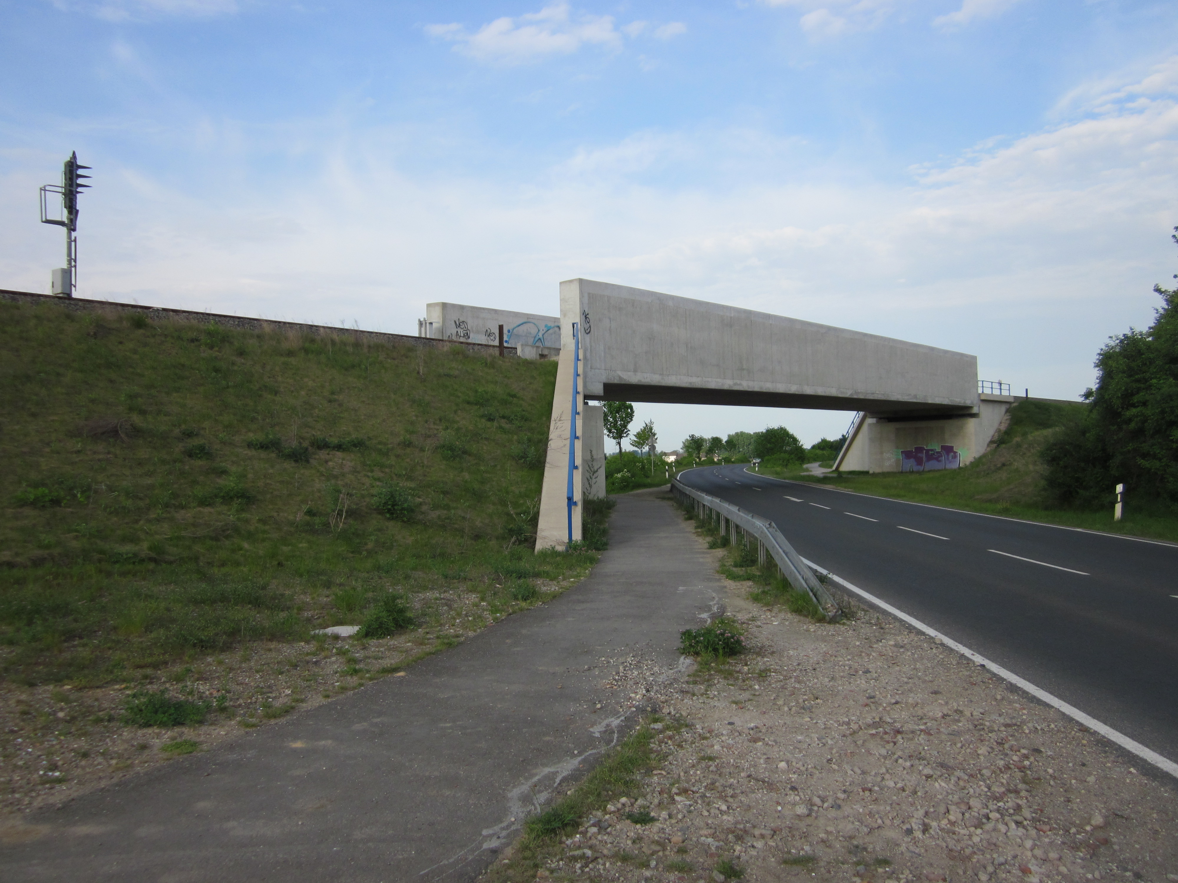 euregiobahn-Brücke über die Bundesstraße 264 zwischen Weisweiler und Langerwehe im westlichen Nordrhein-Westfalen als Teil der Bahnstrecke Eschweiler-Weisweiler–Langerwehe